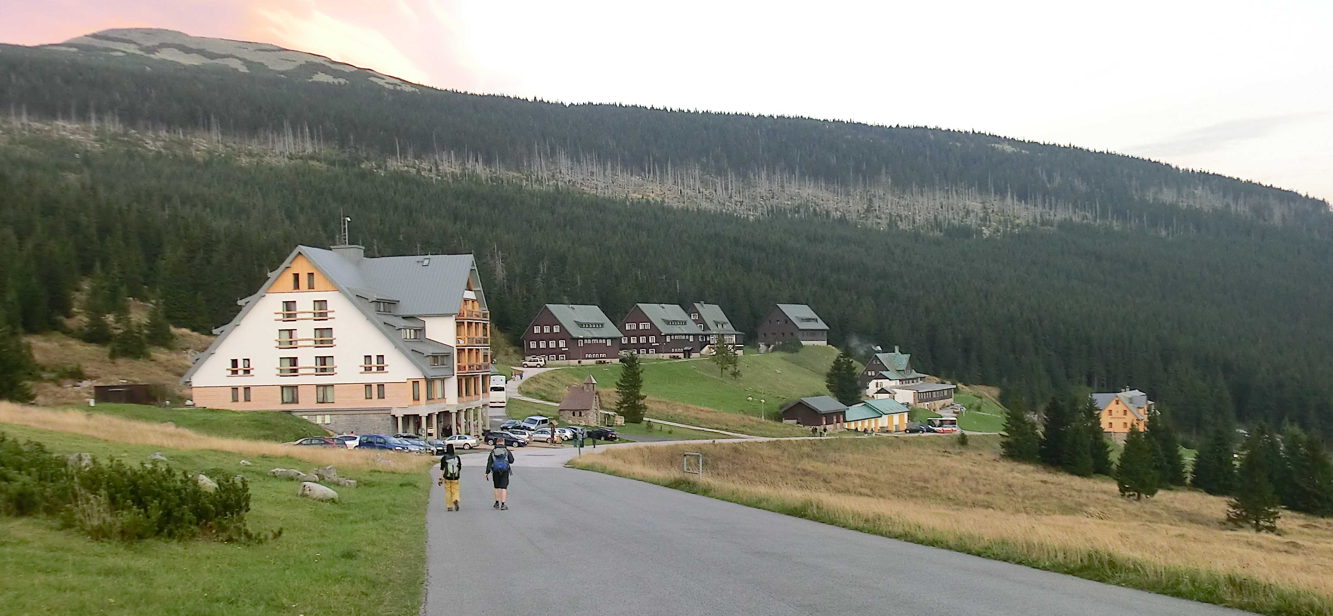 Česky: Krkonoše - komplex Erlebachovy a Josefovy boudy: Erlebachova bouda, penzion David, penzion Martin, vila Tereza, "Vnitro" a Josefova bouda.